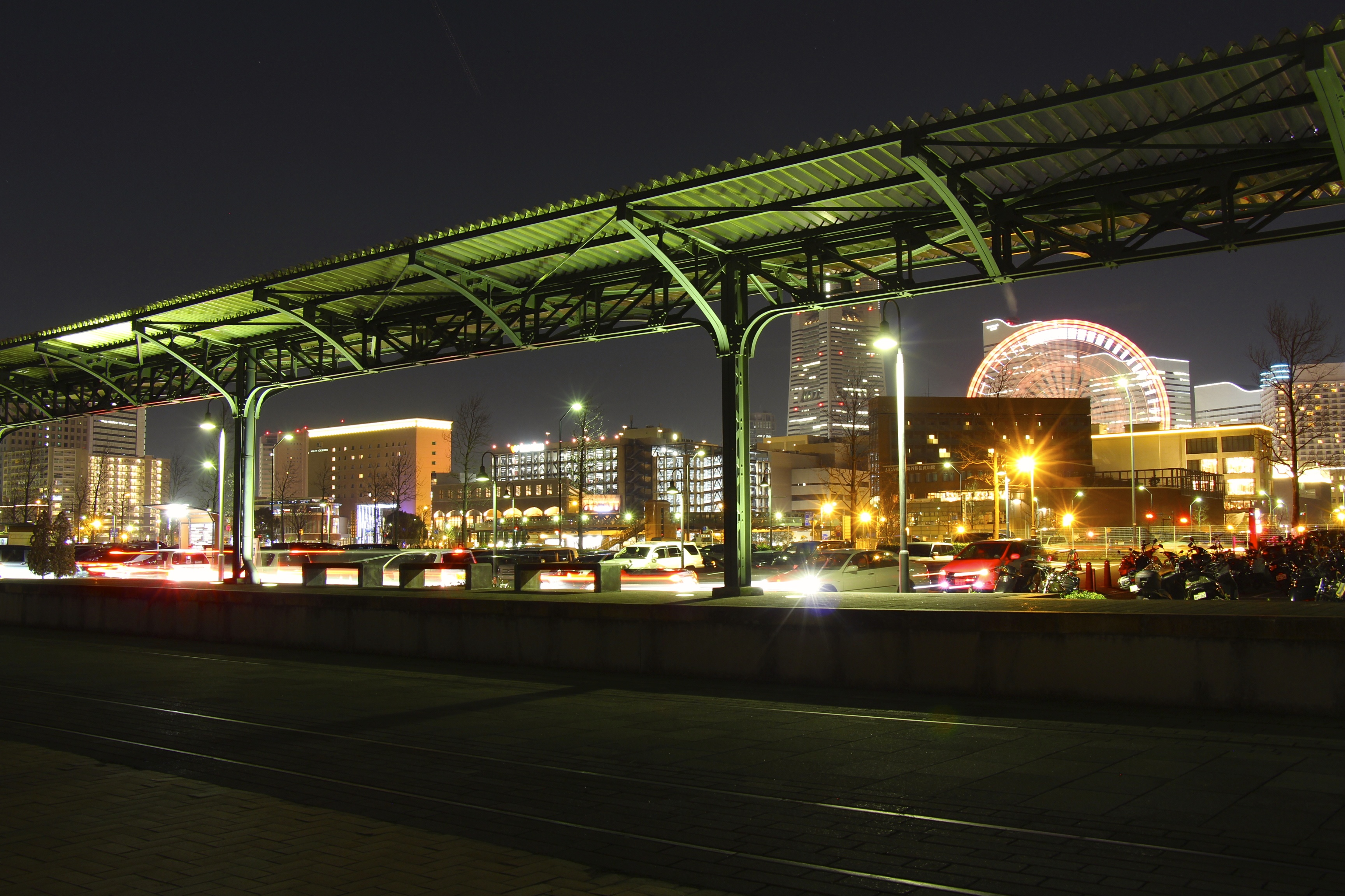 国鉄 横浜港駅跡